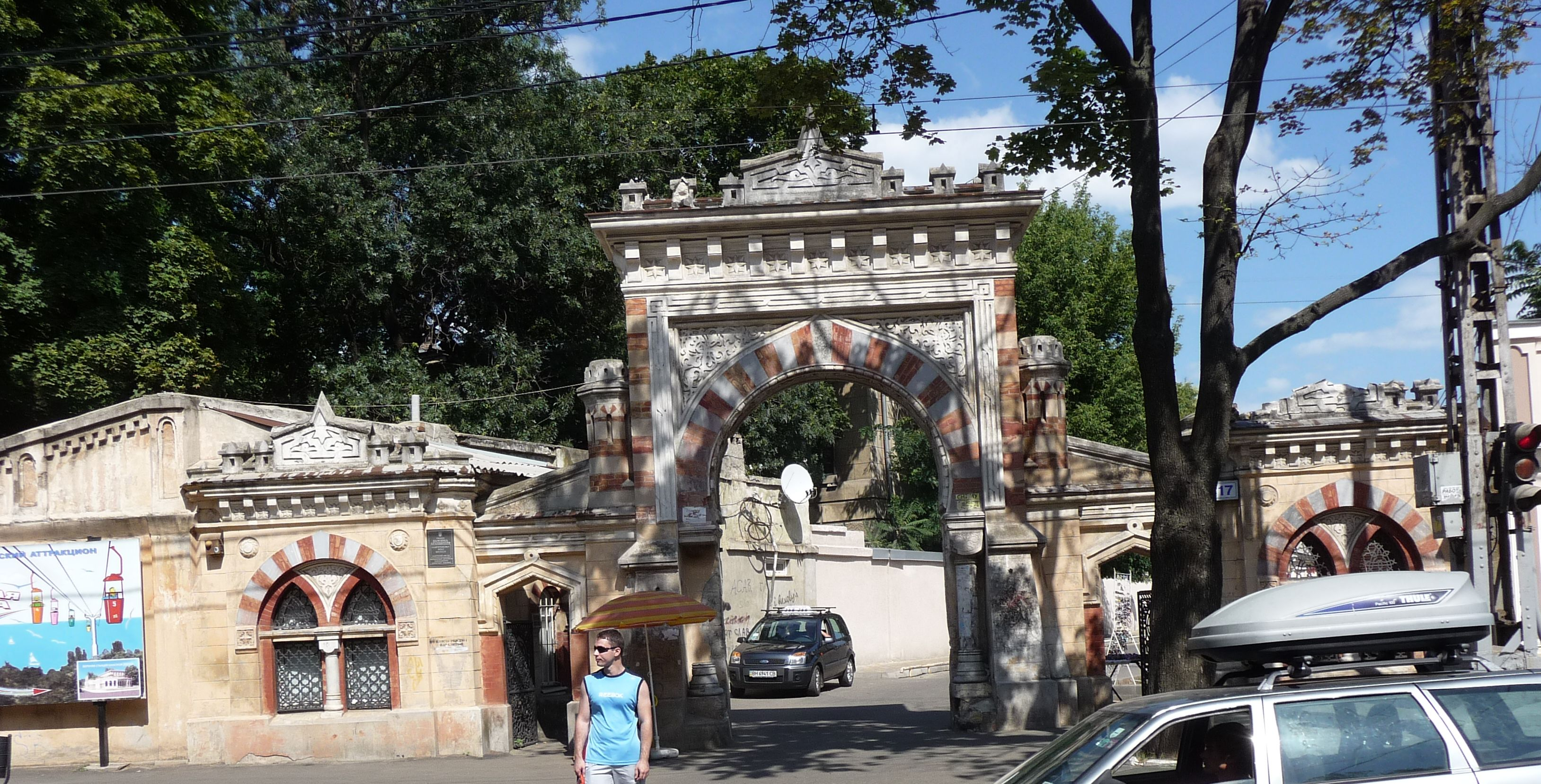 Мавританська арка, Одеса, Французький бул., 17